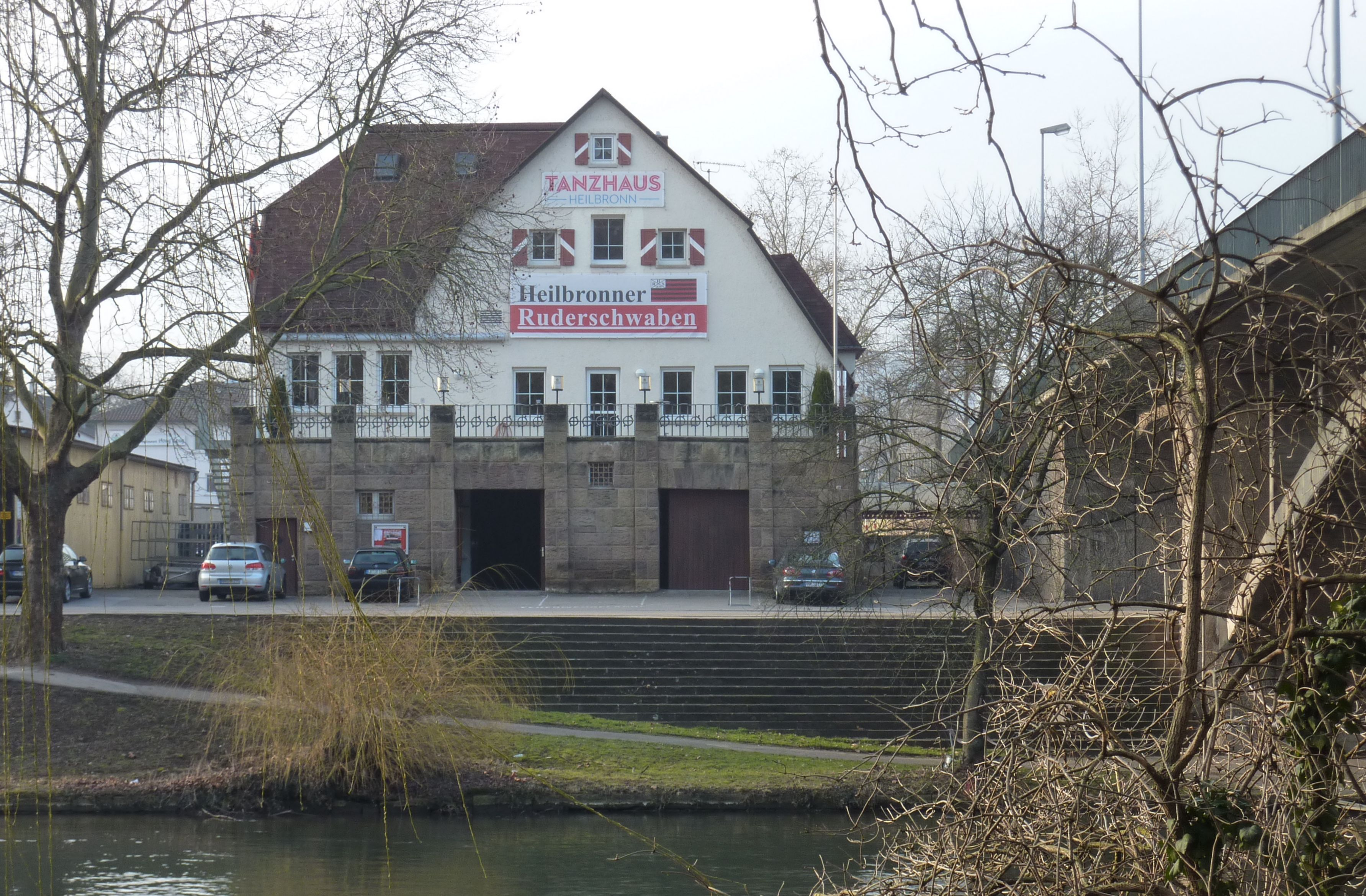 Das Schwabenhaus in der Badstraße Heilbronn. Rechts ein Teil der Rosenbergbrücke.